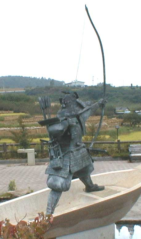 山梨県中央市与一公園浅利与一銅像